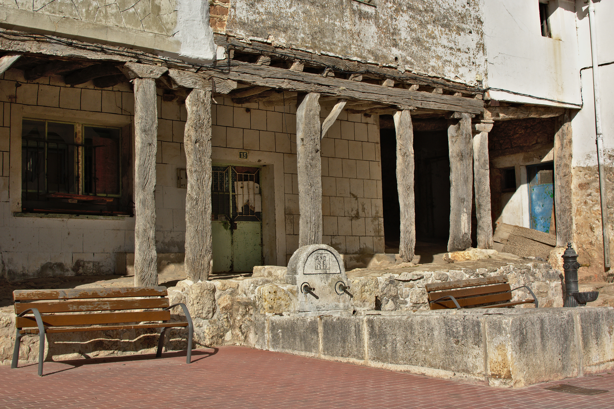 Abrevadero en Cardeñalijo